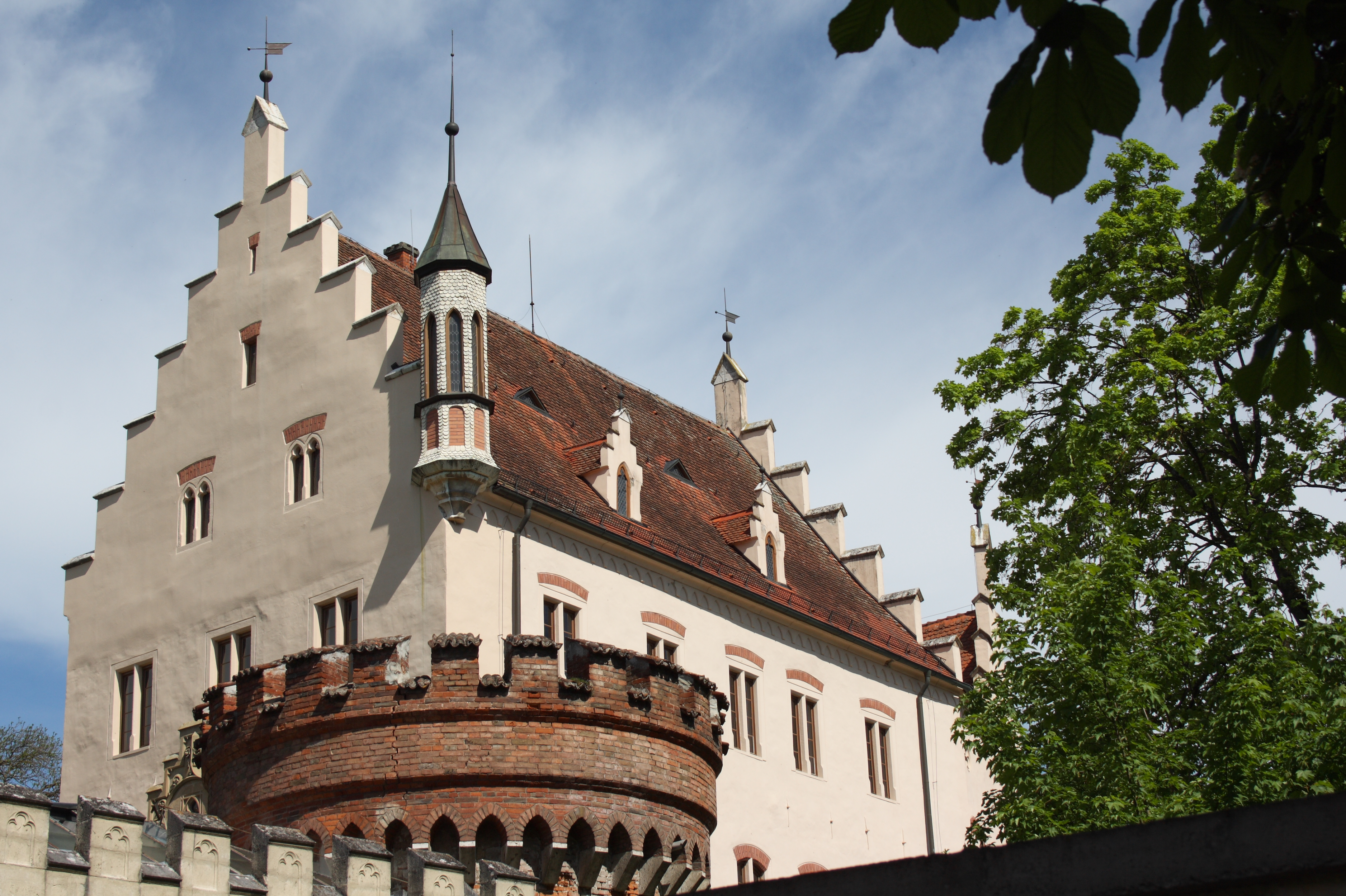 Schloss Haunsheim im Landkreis Dillingen an der Donau (Bayern)